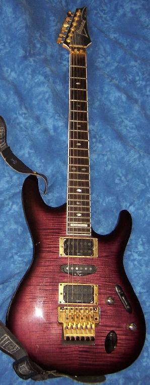 Guitare électrique Ibanez Series S 540